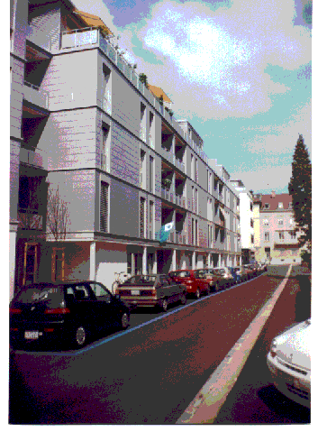 Sidejo de Allsprachendienst Esperanto GmbH Foto farita de Dietrich Michael Weidmann Kategorio:Bildoj de Kantono Zuriko Kategorio:Bildoj alŝutitaj de DidiWeidmann Kategorio:Bildoj faritaj de DidiWeidmann